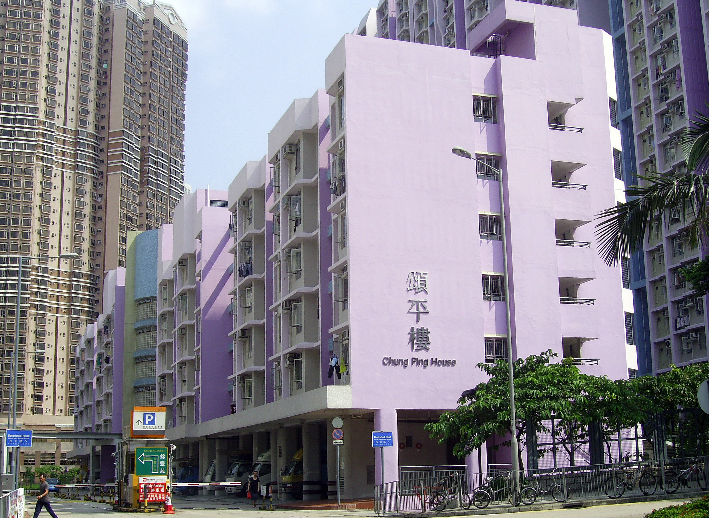 中文（香港）: 頌安邨頌平樓